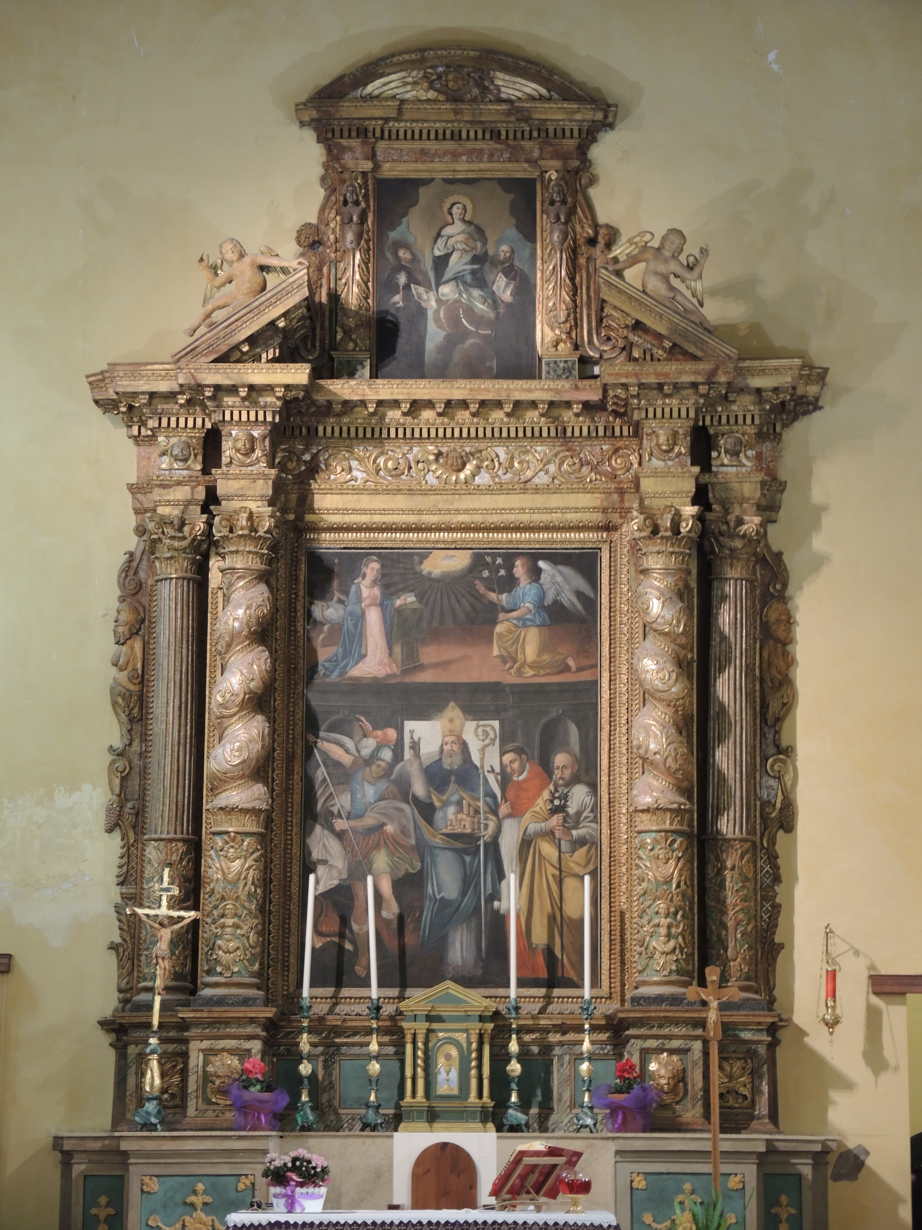 Cellino Attanasio: Chiesa di Santa Maria la Nova